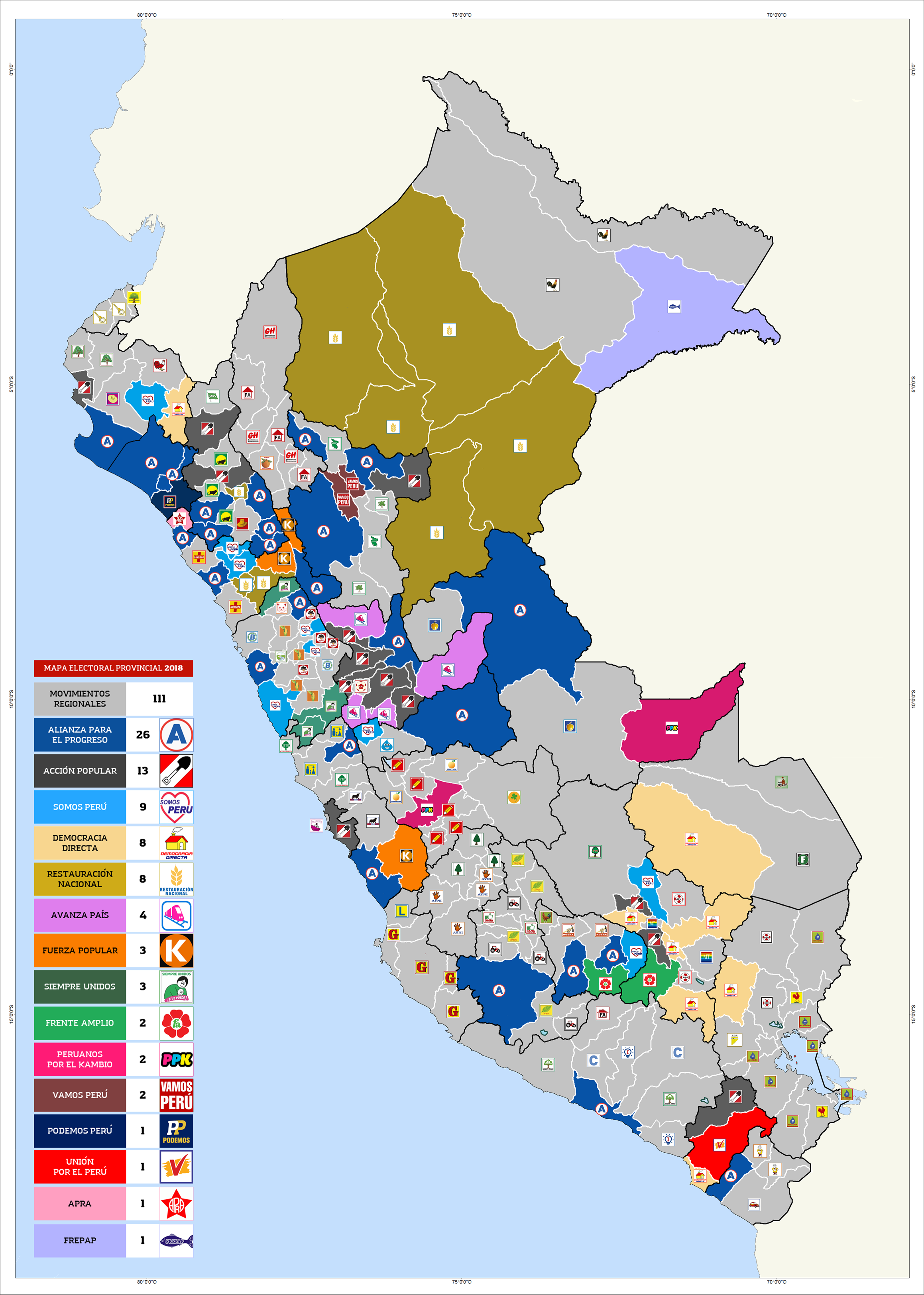 Mapa Electoral Provincial Perú 2018